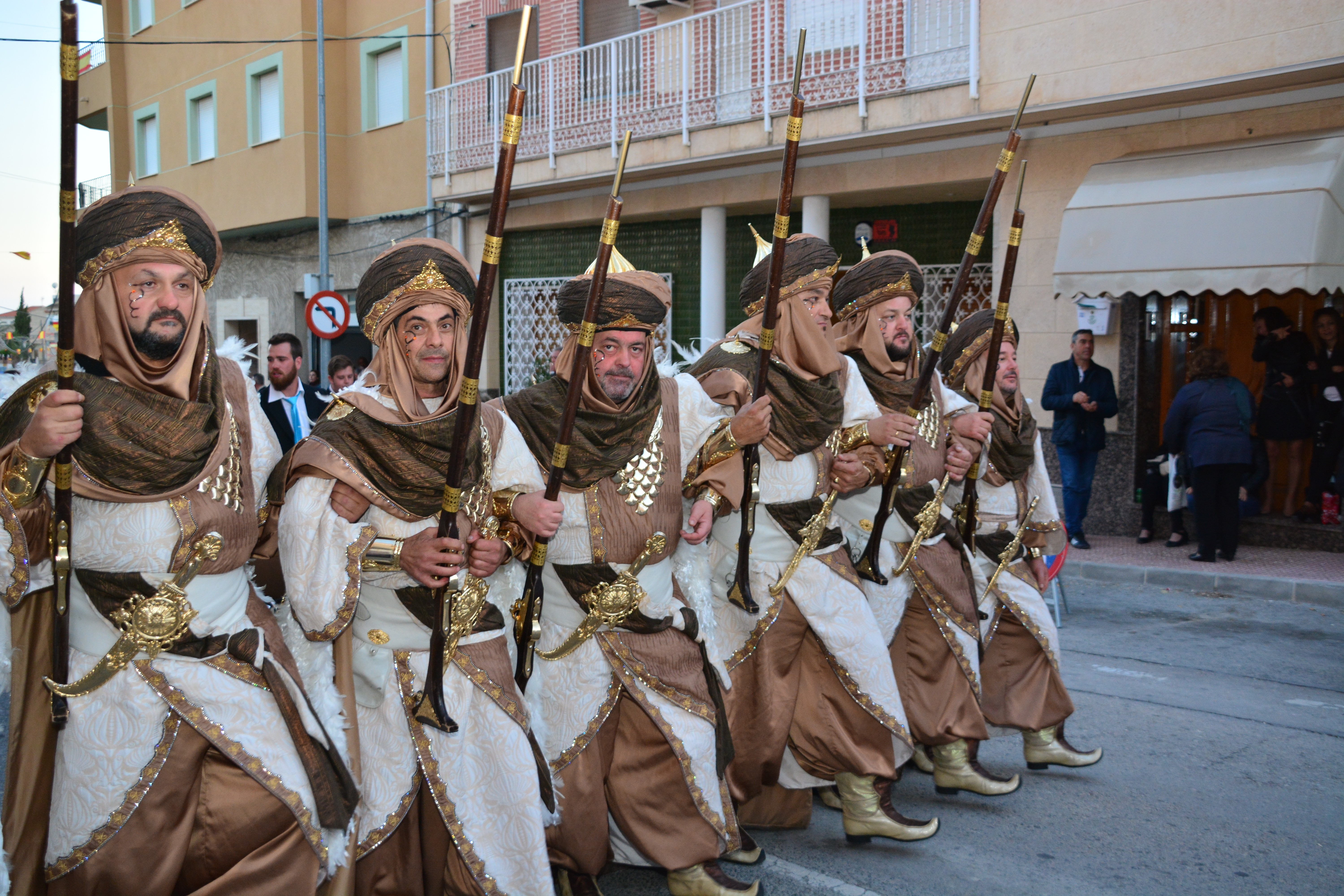 Moros y Cristianos de Abanilla This is a photography of a Folklore festival in Spain (Wikidata id Q23660880).